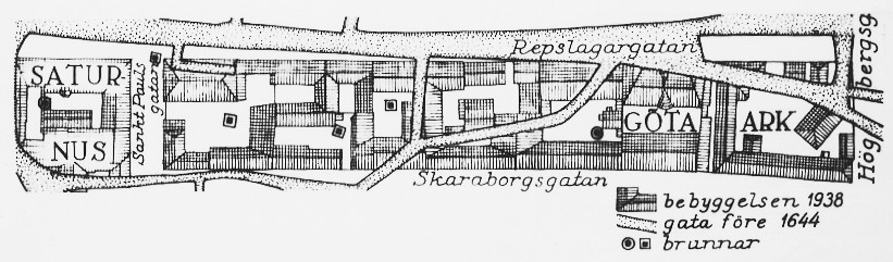 Karta över kvarteret Göta ark, med byggnader 1938 och gator från före 1644. Bebyggelsen revs på 1930-talet för Södergatan. På 1980-talet återskapades kvarteret som fick namnet Noe ark.